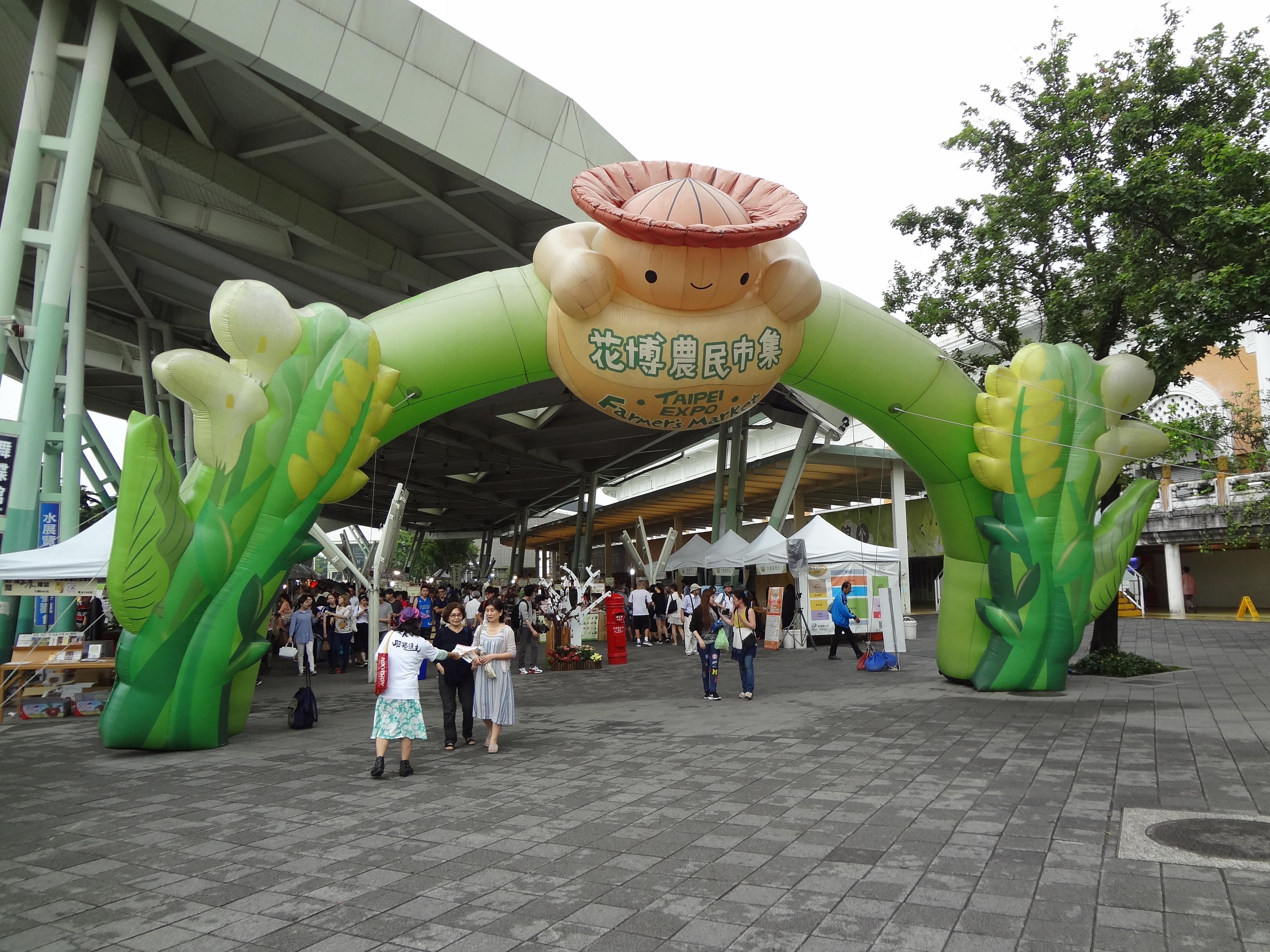 中文（台灣）: 花博農民市集，位於臺北市花博公園圓山廣場長廊。